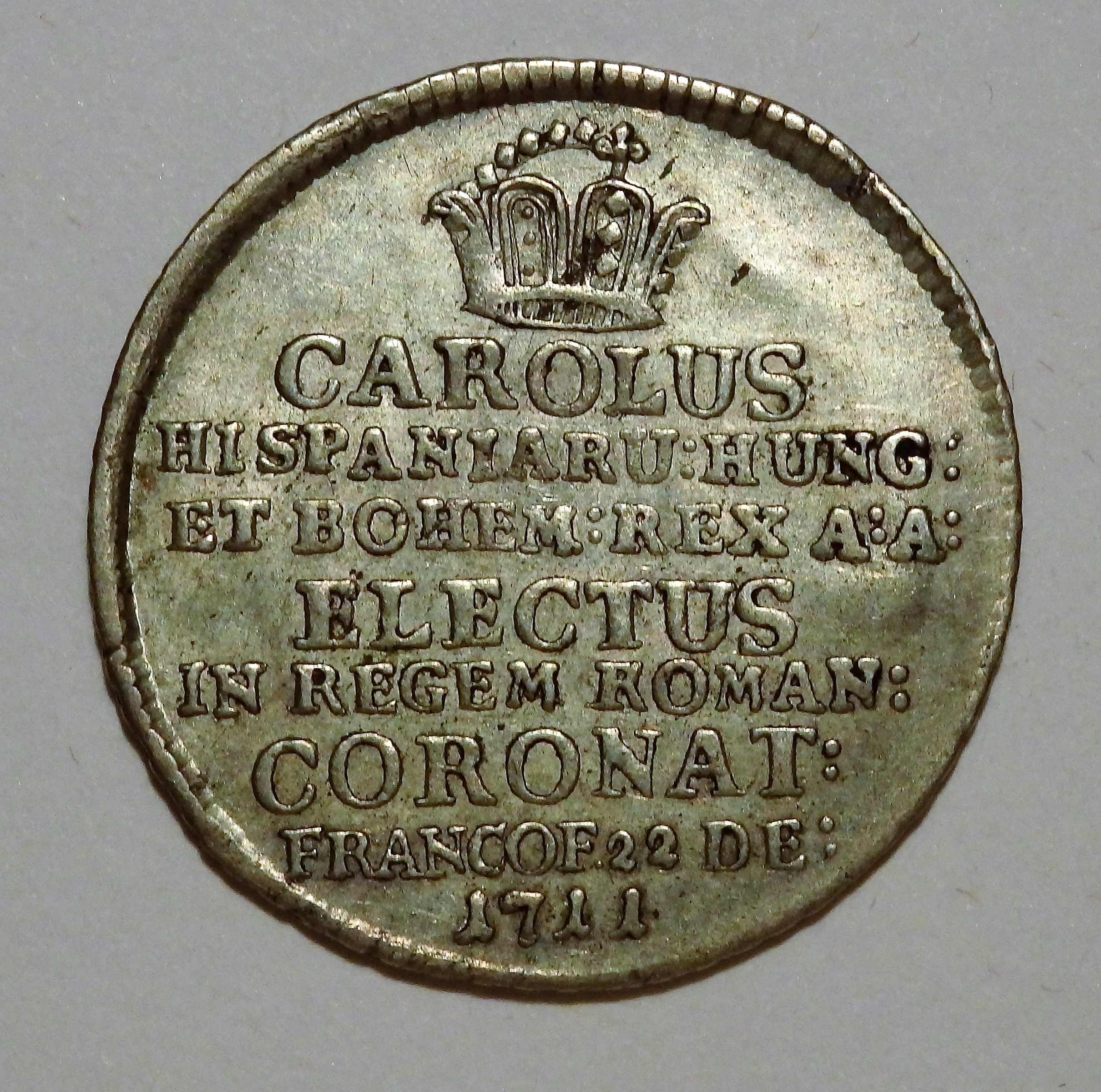 Doppeldukatsilberabschlag auf Krönung Karls des VI., Frankfurt